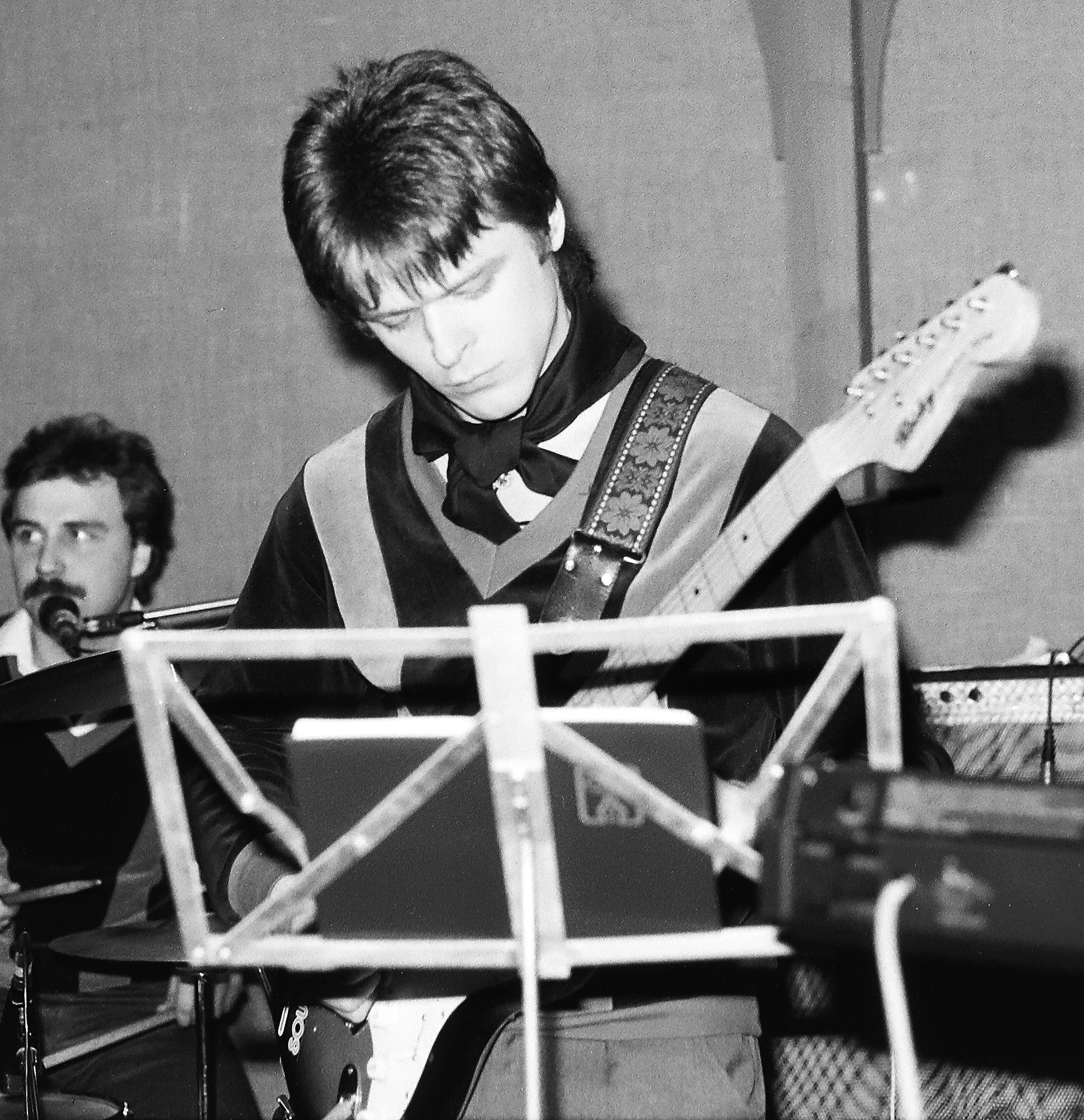 Endel Jõgi, välismaal Endel Rivers, Eesti päritolu Austraalia muusik 85